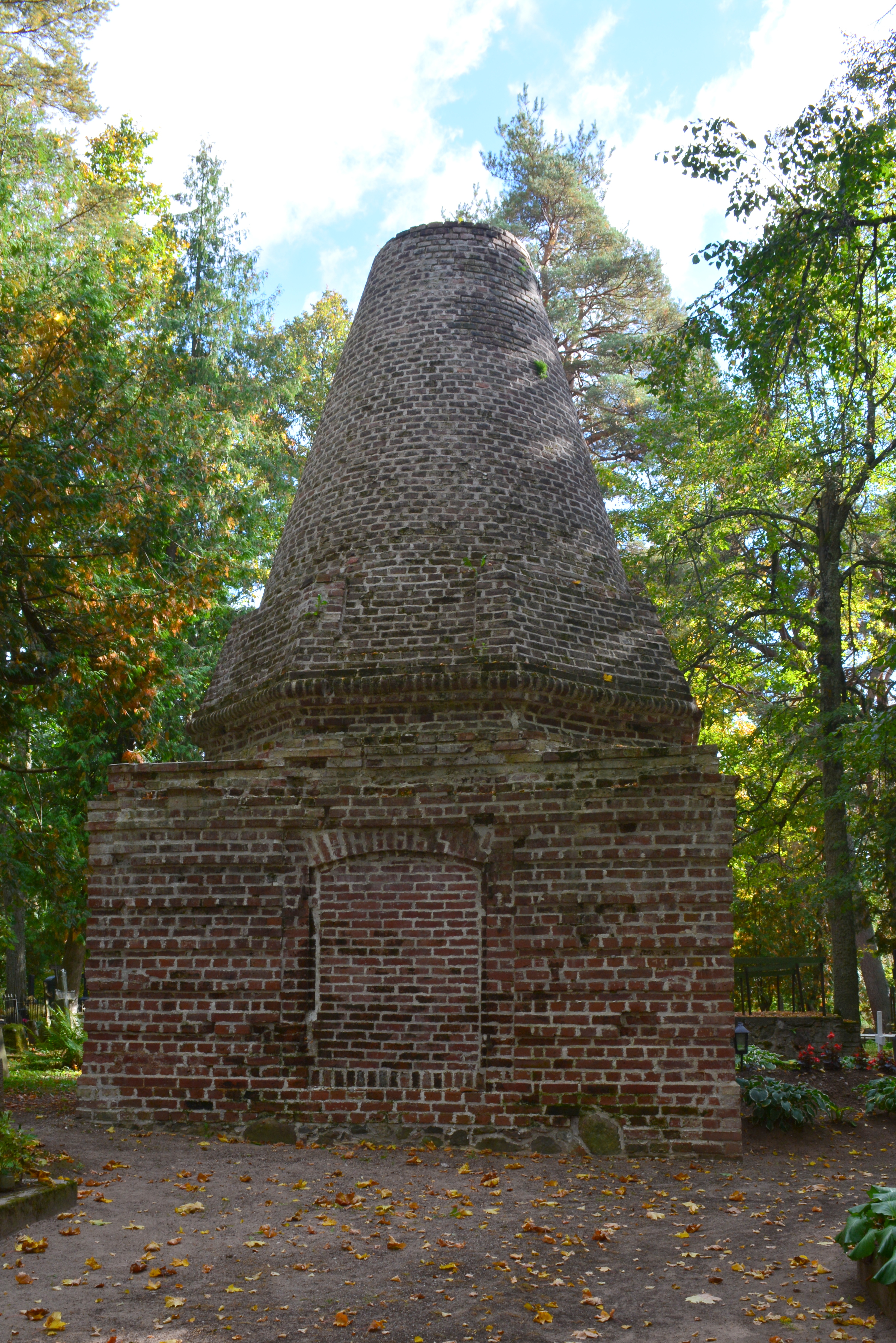 Võnnu kalmistu Villebois kabel